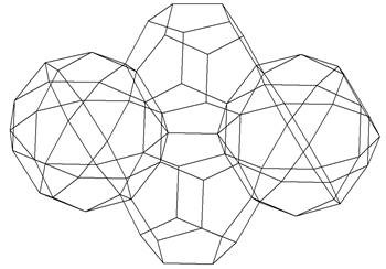 A kis rombuslapos triakontaéder egy lapja